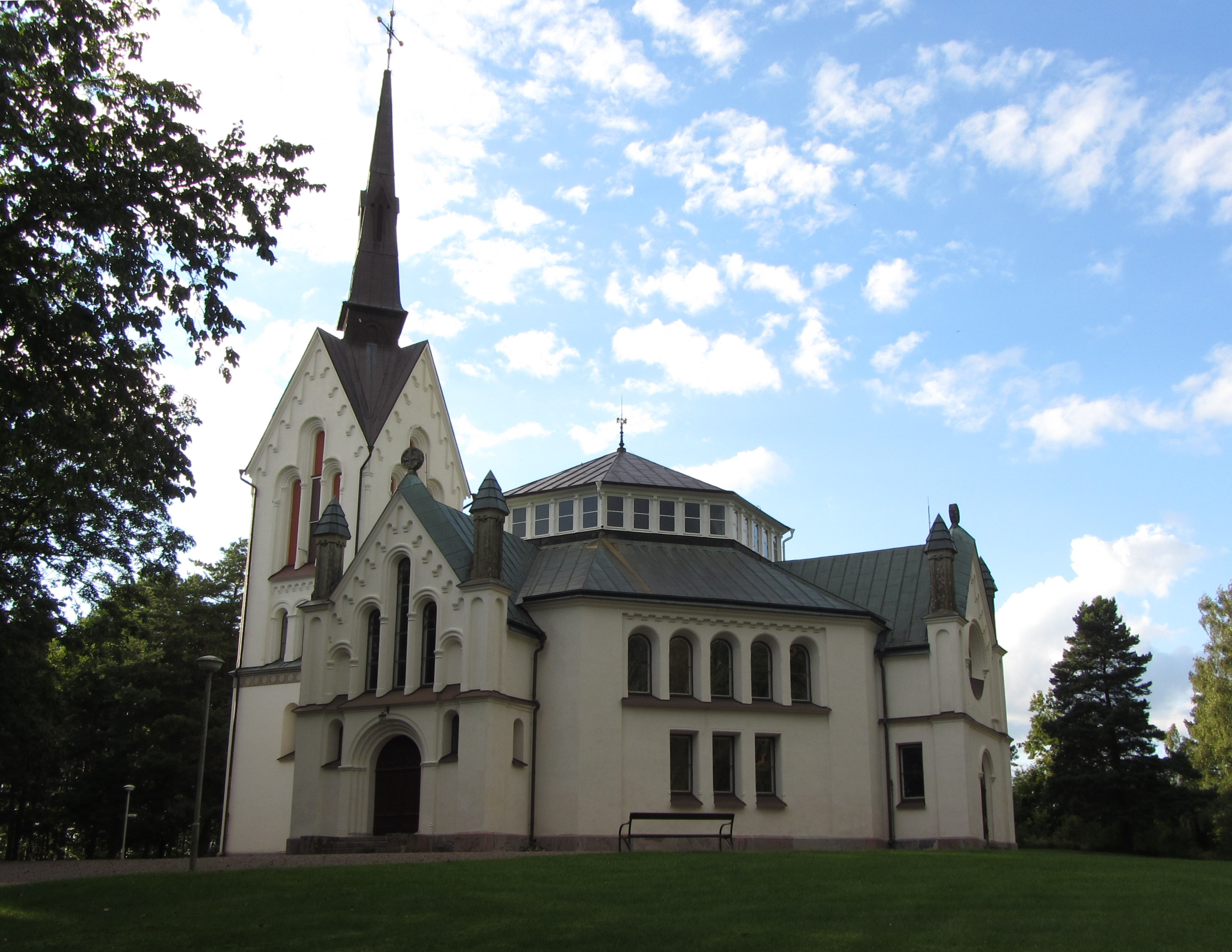 Holmestads kyrka